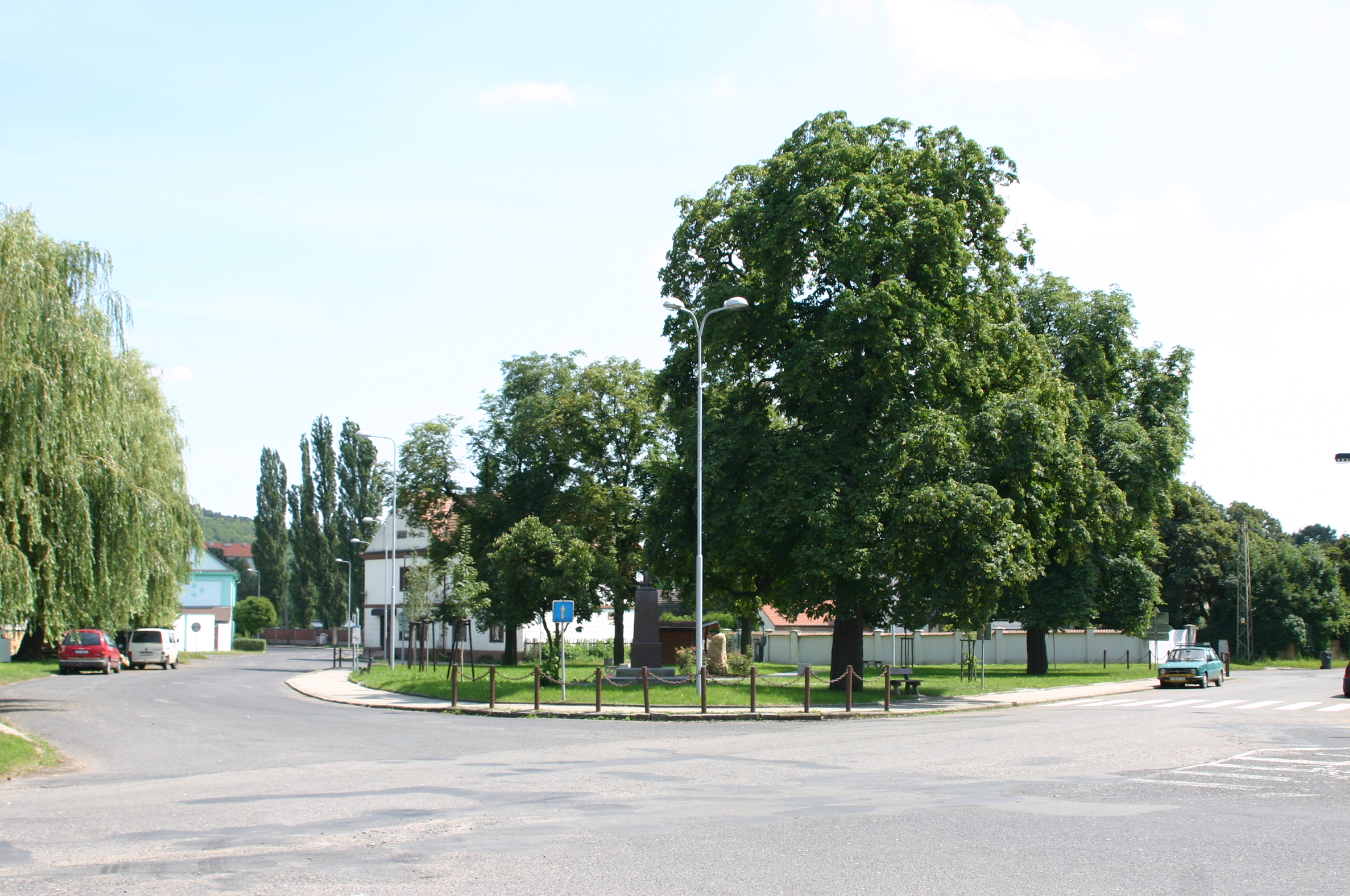 Náves v obci Braňany v okrese Most.